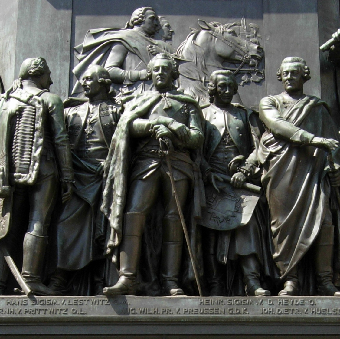 August Wilhelm, Prinz von Preußen, Bruder Friederichs II. und Vater Friedrich Wilhelms II., Detail (Ostseite, Vorderansicht) am Denkmal Friedrichs II. von Christian Daniel Rauch Unter den Linden in Berlin-Mitte (G.D.K. in der Unterschrift bedeutet General der Kavallerie). Der Offizier rechts vom Beschauer, Oberst Heinrich Sigismund von der Heyde, hält einen Plan der Festung Kolberg in der Linken (er hat die Festung im Siebenjährigen Krieg gegen russische Truppen verteidigt)